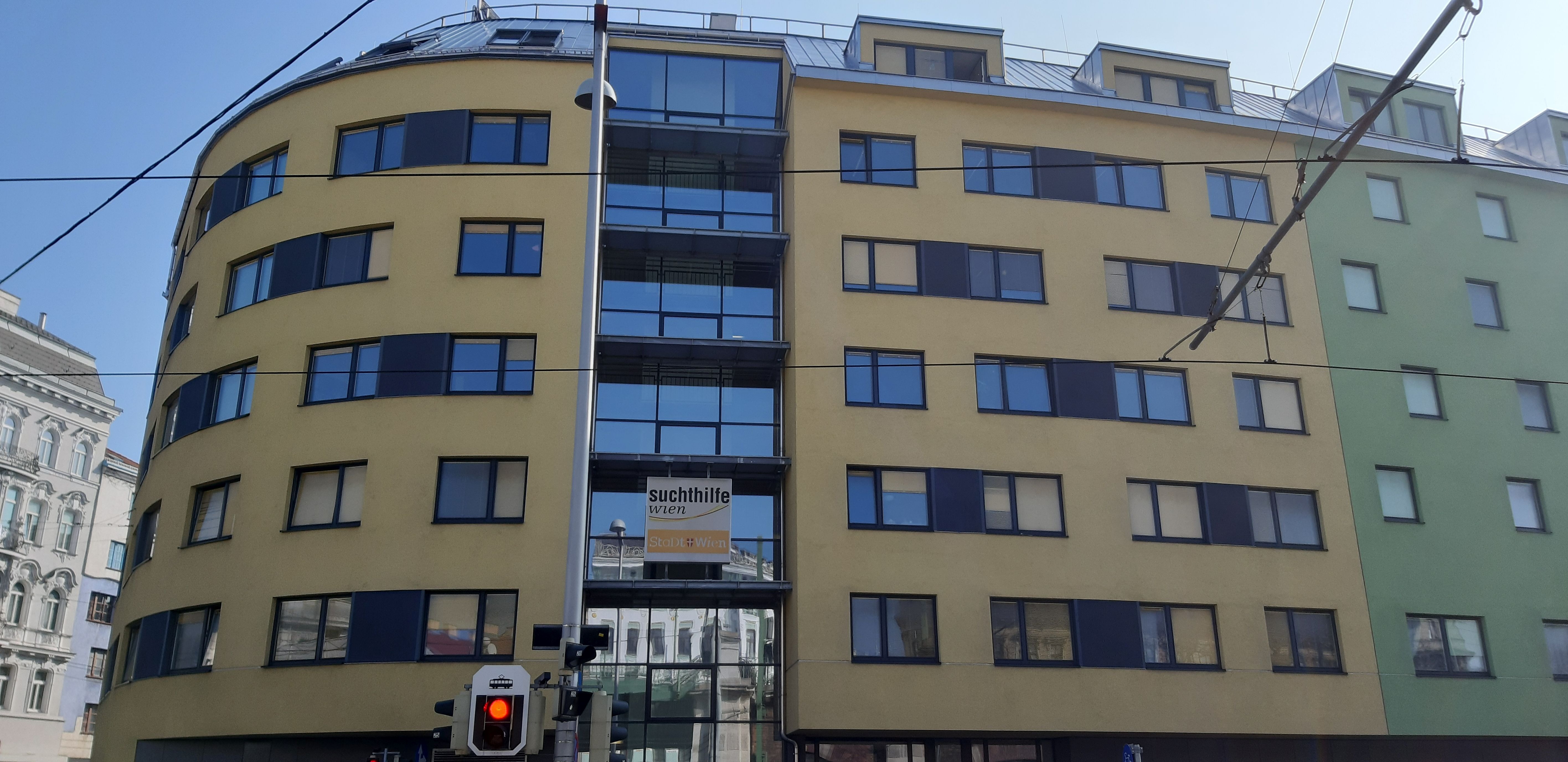 Zentrale der Suchthilfe Wien